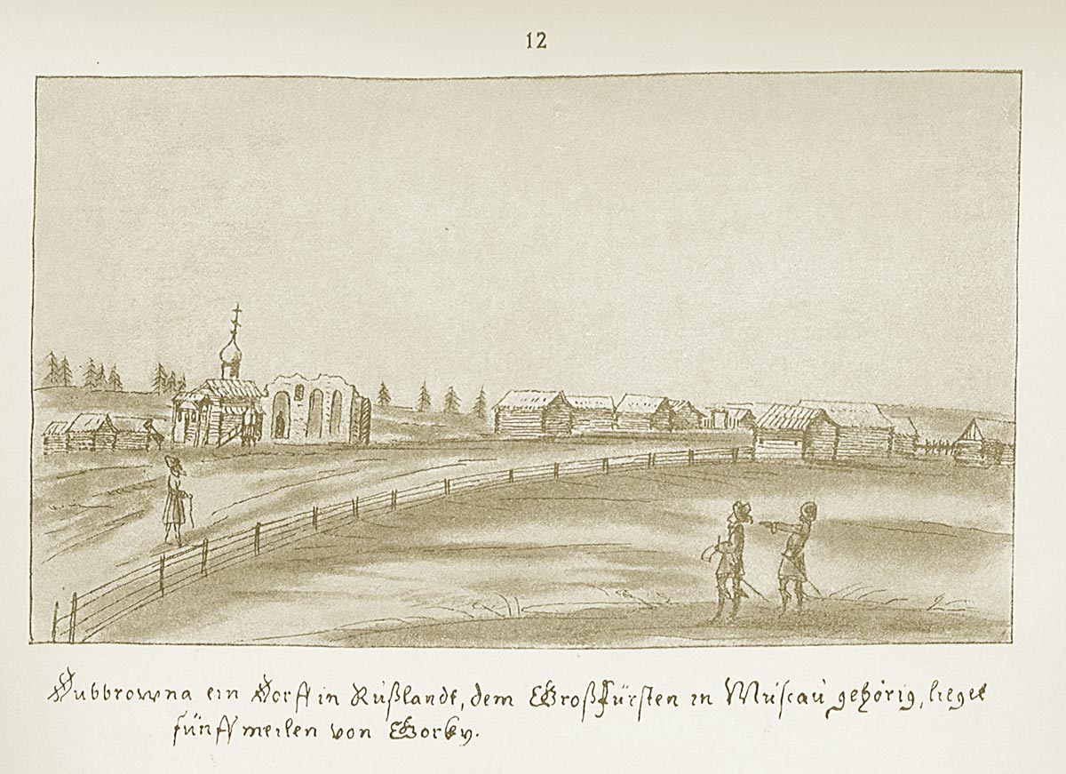 Дубровна